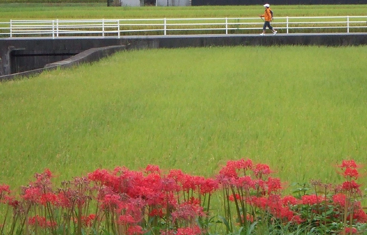 四元奈生美が四国遍路をしたとき